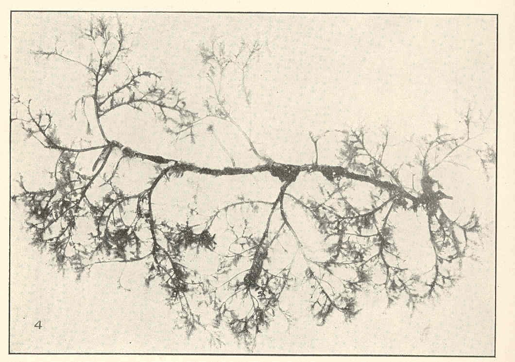 Brongniartella mucronata, a red alga = Heterodasya mucronata